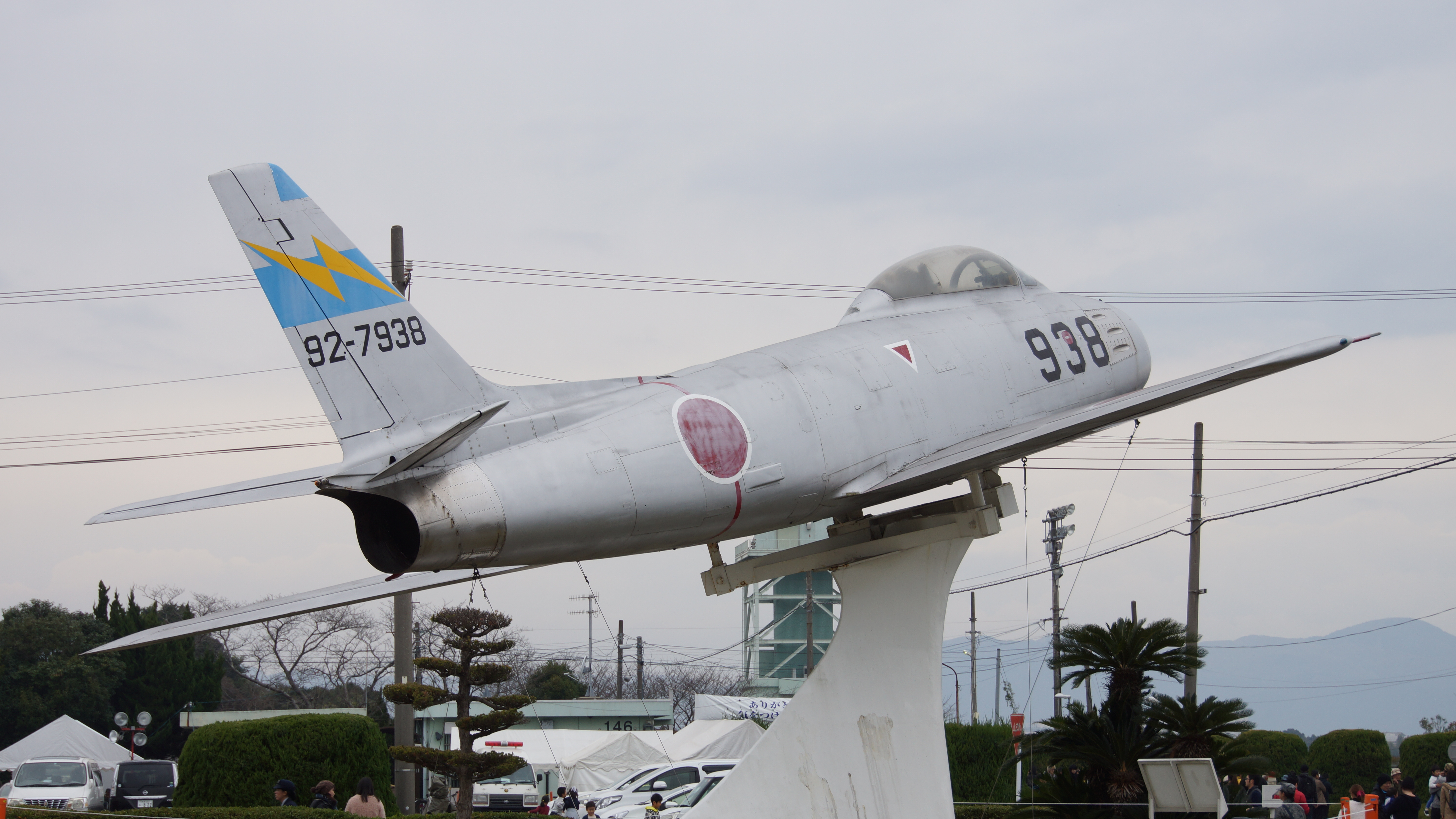 航空自衛隊 F-86F戦闘機（92-7938号機） 右後部。2017年11月26日 築城基地にて。